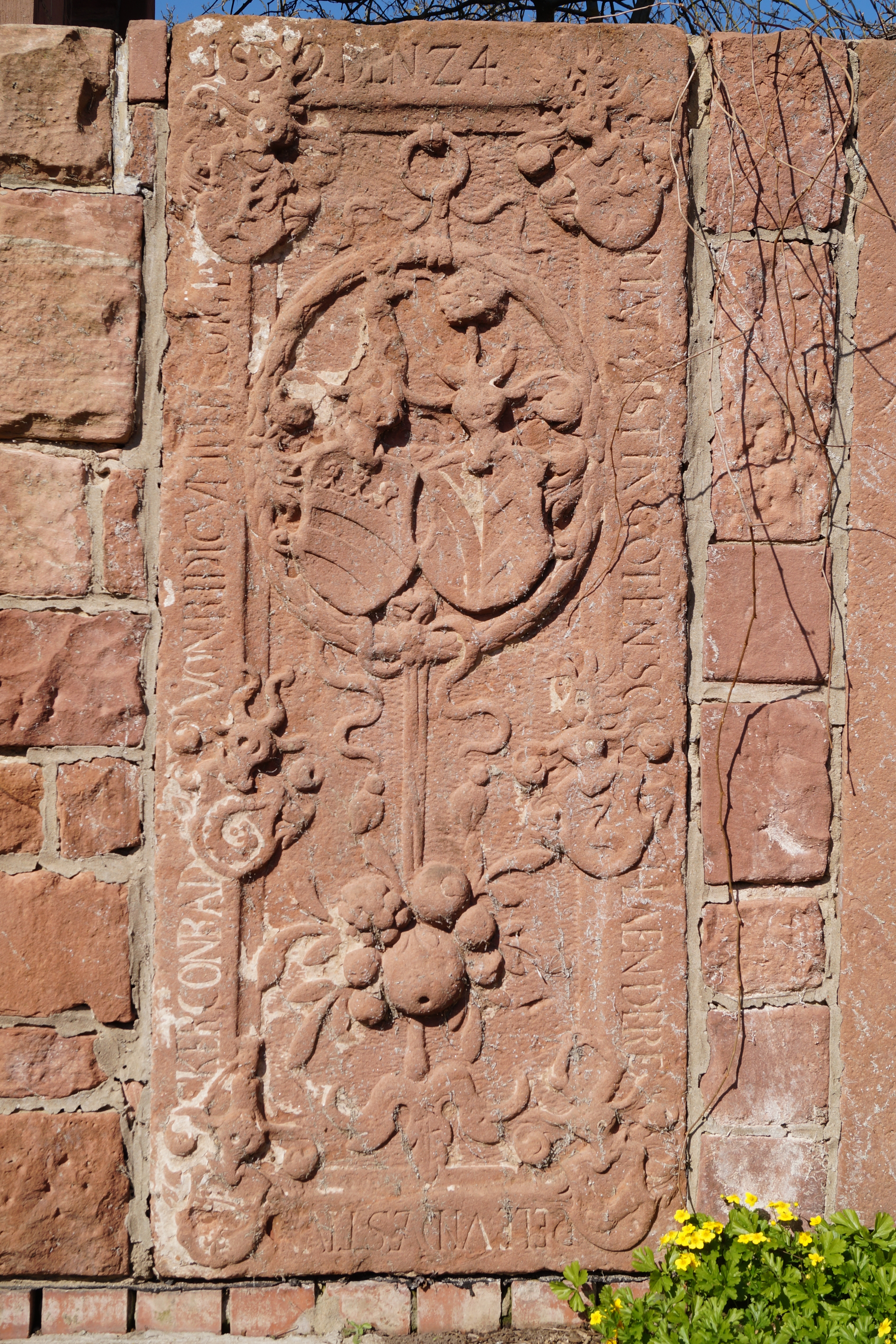 Grabplatte des Conrad von Rüdigheim (gestorben 1599) an der Evangelischen Kirche in Erlensee-Rückingen, Hessen.